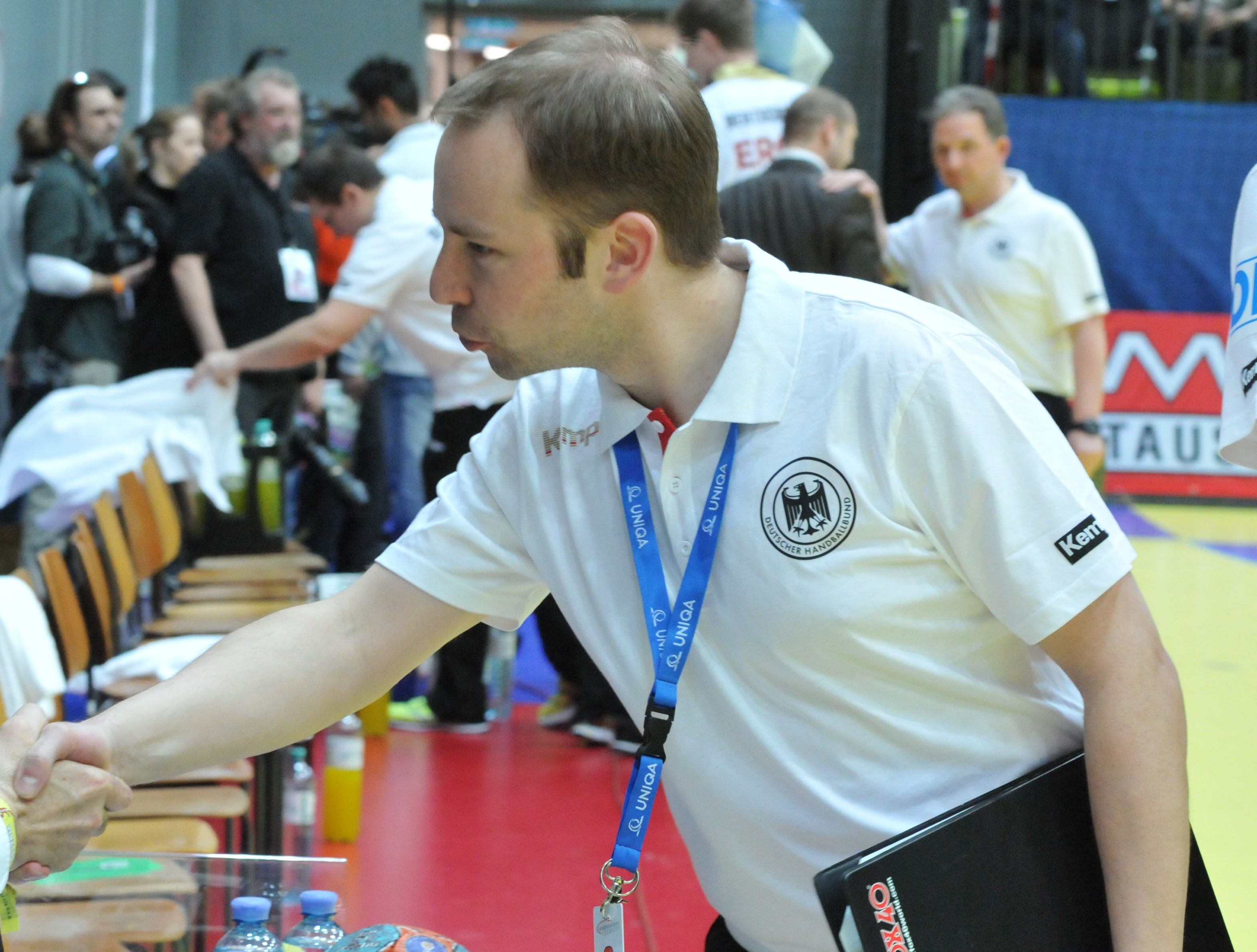 Jan Gorr vor dem Handball-Freundschaftsspiel zwischen Österreich und Deutschland am 4. März 2014